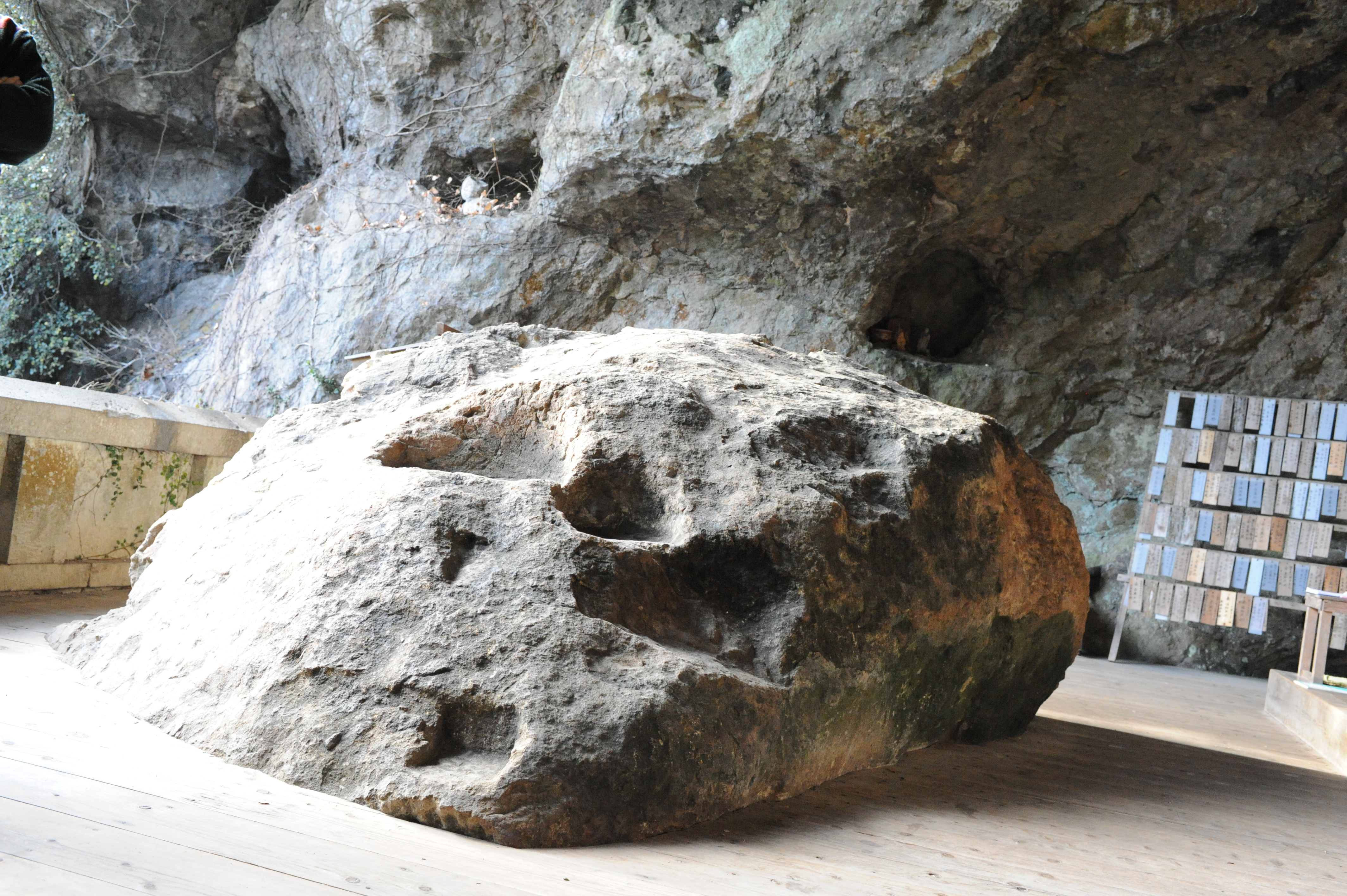 Pierre sur laquelle Miyamoto Musashi médita et écrivit le Gorin No Sho, ouvrage de stratégie et de sabre.